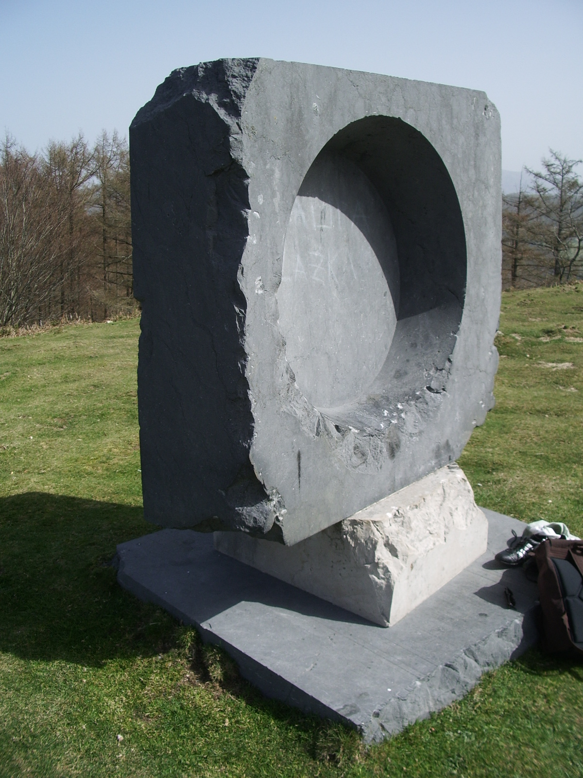 Irudia/Image: Aita Donostiaren monumentua Jorge Oteizak egina (Agina, Lesaka, Nafarroa) Argazkilaria/Photographer: Josu Goñi Etxabe